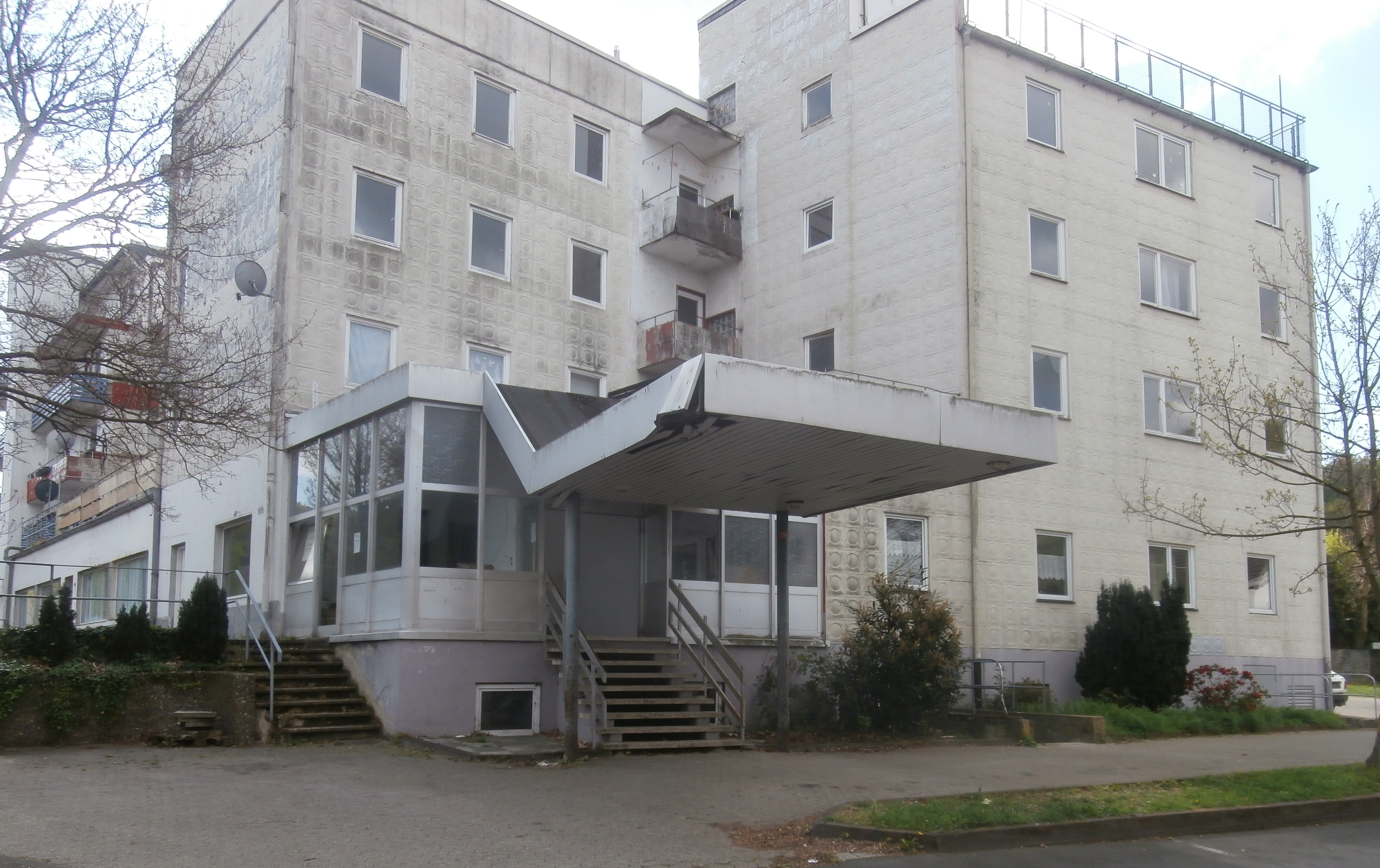 Ehemalige Botschaft der Volksrepublik China, Konrad-Adenauer-Straße 104, Niederbachem, Wachtberg. Das Gebäude wurde vorher als Hotel genutzt.